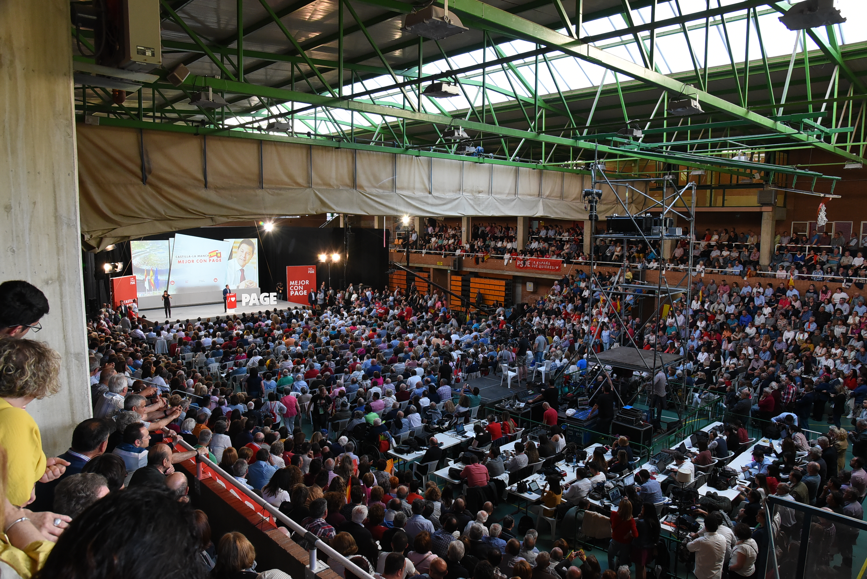 Vista del Pabellón de la Feria de Albacete durante un mitin del presidente del Gobierno Pedro Sánchez